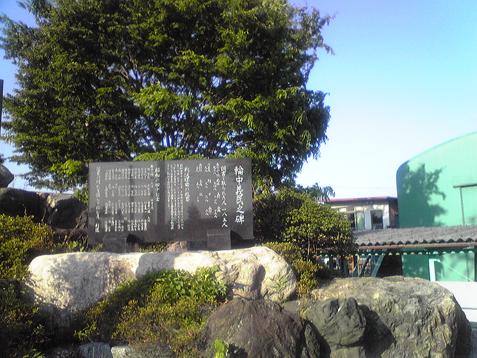 Saikawa Jiken Kinenhi(犀川事件を記念した石碑)、Anpachi,Gifu,Japan(岐阜県安八町)